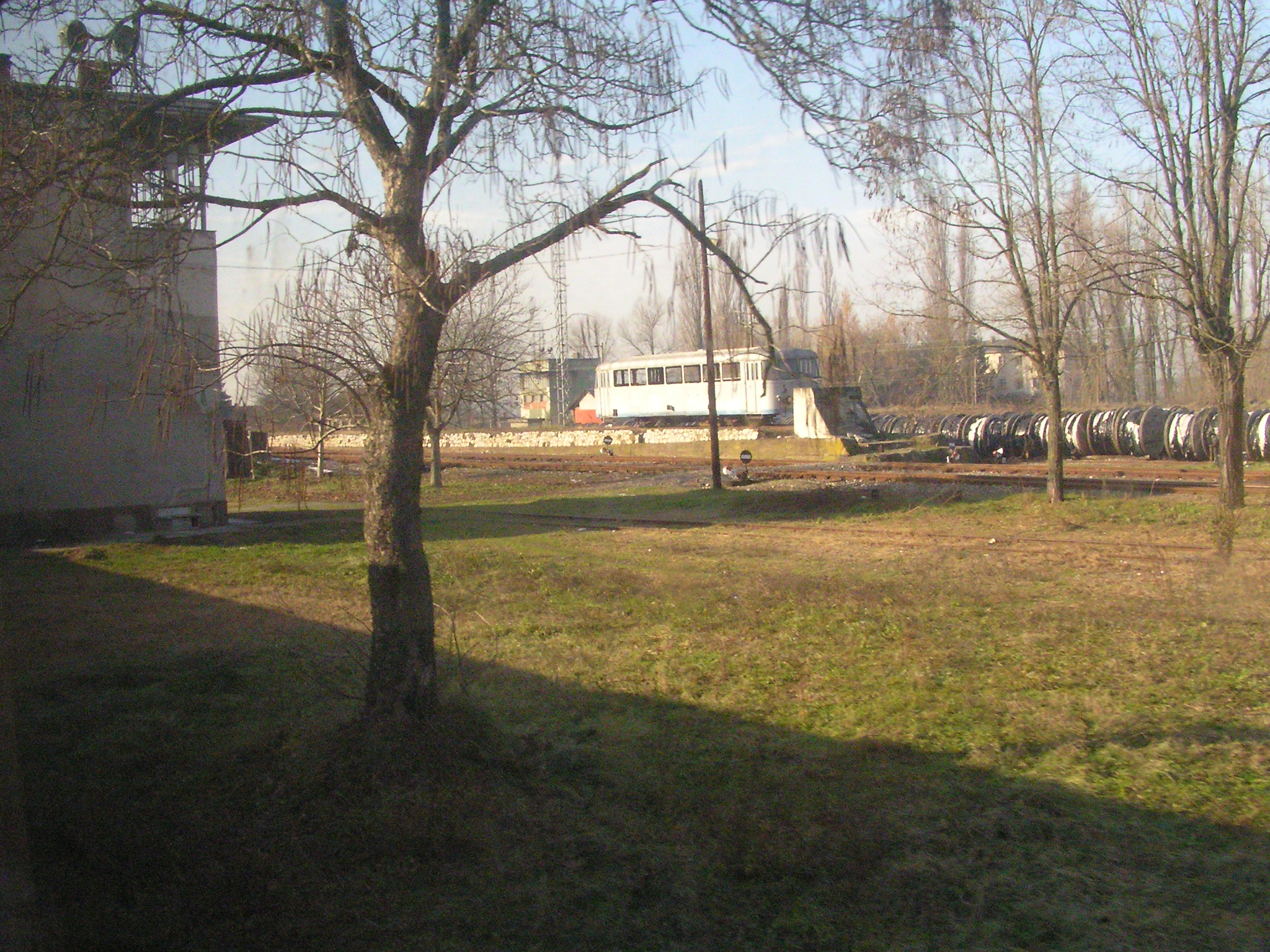 A defunct motor unit